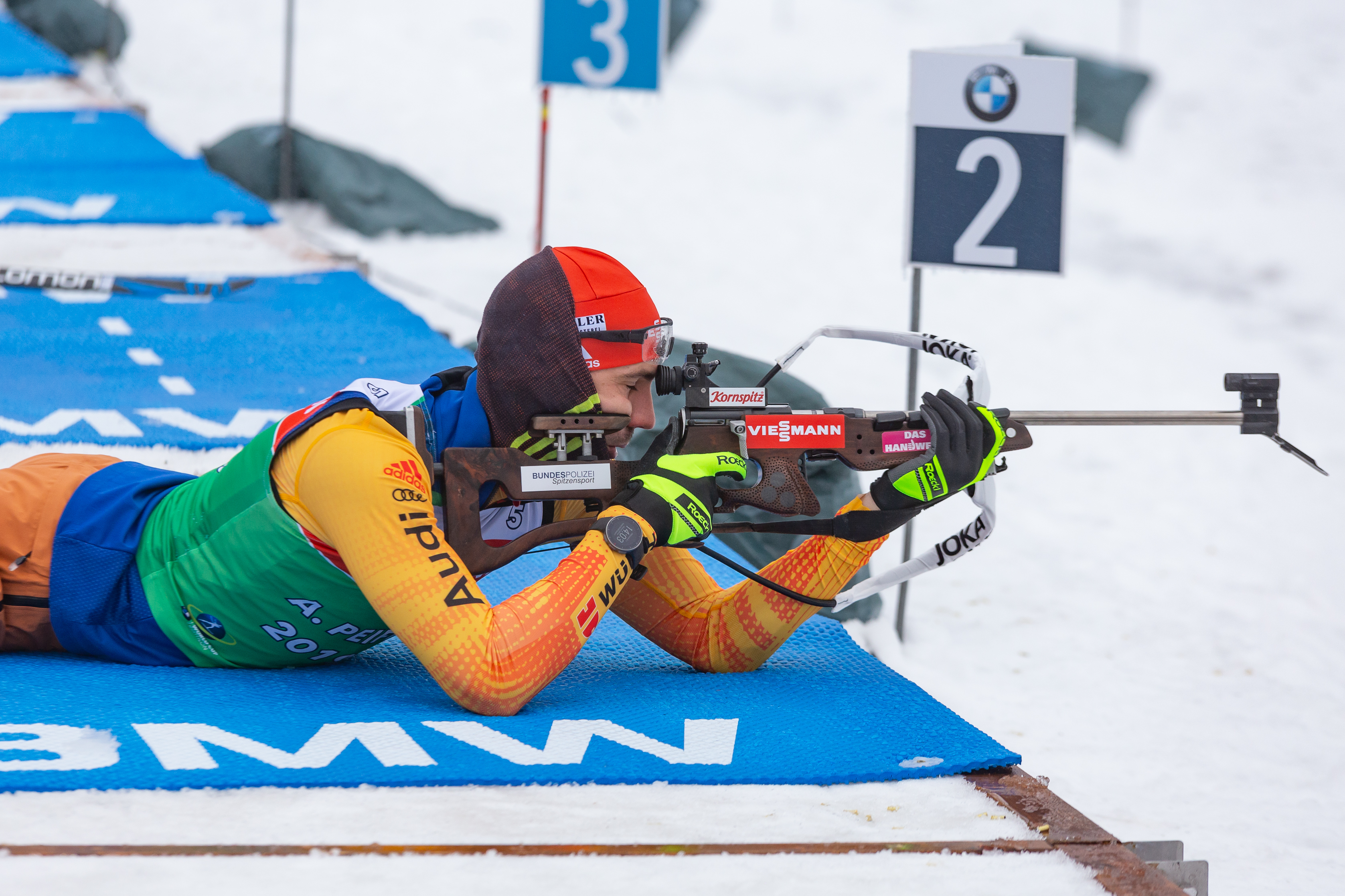 IBU World Cup Biathlon Oberhof; Arnd Peiffer (GER, Deutschland); beim Liegendschießen